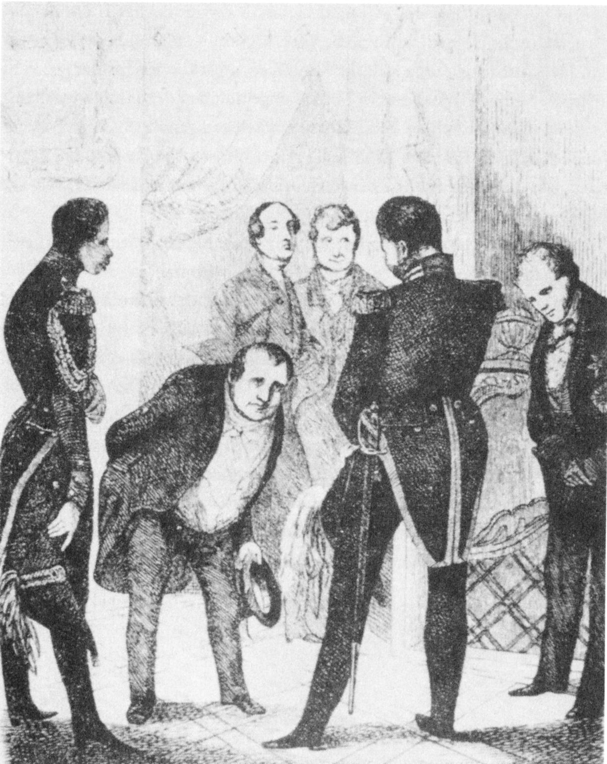 Der gichtleidende Ludwig Tieck verbeugt sich vor dem preussischen König Friedrich Wilhelm IV. Karikatur zu Ungern-Sternbergs satirischem Roman "Tutu. Phantastische Episoden und poetische Excursionen" (Leipzig 1846).